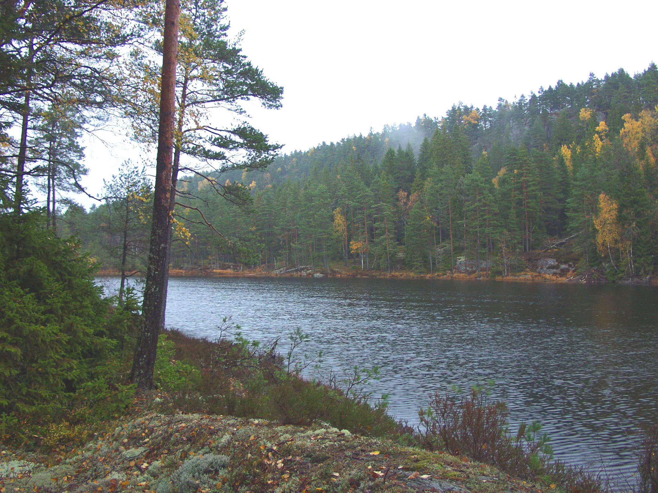 Die typische Landschaft in Tresticklan am Beispiel des Sees Langetjärn